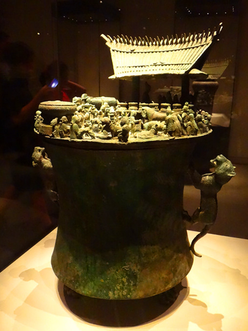 诅盟场面青铜贮贝器，西汉，1955-1956年出土于云南晋宁石寨山。拍摄于中国国家博物馆